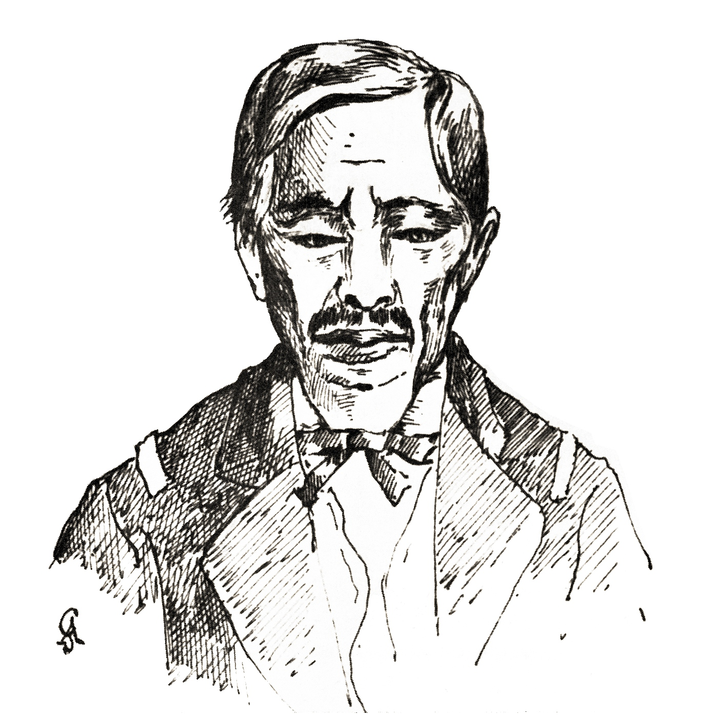 Bernardo Putairi, Prince Régent des Îles de Gambier. Dessin à la plume signé A. G. (Arch. Picpu.i, 64,9, n° 138). Arone, quand il démissionnera en juillet 1872, sera remplacé au gouvernement par Bernardo, qui meurt le 9 déc. 1874 — Au dos de la photographie, on lit cette note, qui doit remonter à 1910 : « II n'est pas nécessaire de me rappeler les traits de ce vieillard après plus de 'il ans ; son costume, avec ses 2 bandes pour y glisser ses épaulettes m'indiquent assez que c'est Bernardo Putairi — père de notre prêtre mangarevien — portant l'habit de colonel envoyé par Louis-Philippe au roi Maputeoa. Il était régent sans être de la famille royale. Il avait été cuisinier du roi. Ce costume, bien rapé, portait ombrage à .M. Martial Martin dans les fêtes ; alors [que] celui-ci, [était] résident aux Gambier »..